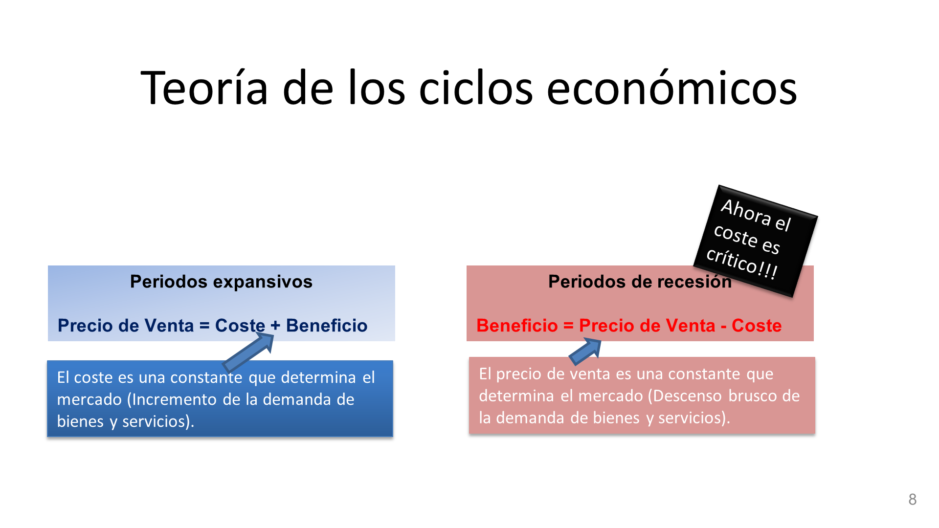 Comportamiento del coste en distintos ciclos econónmicos